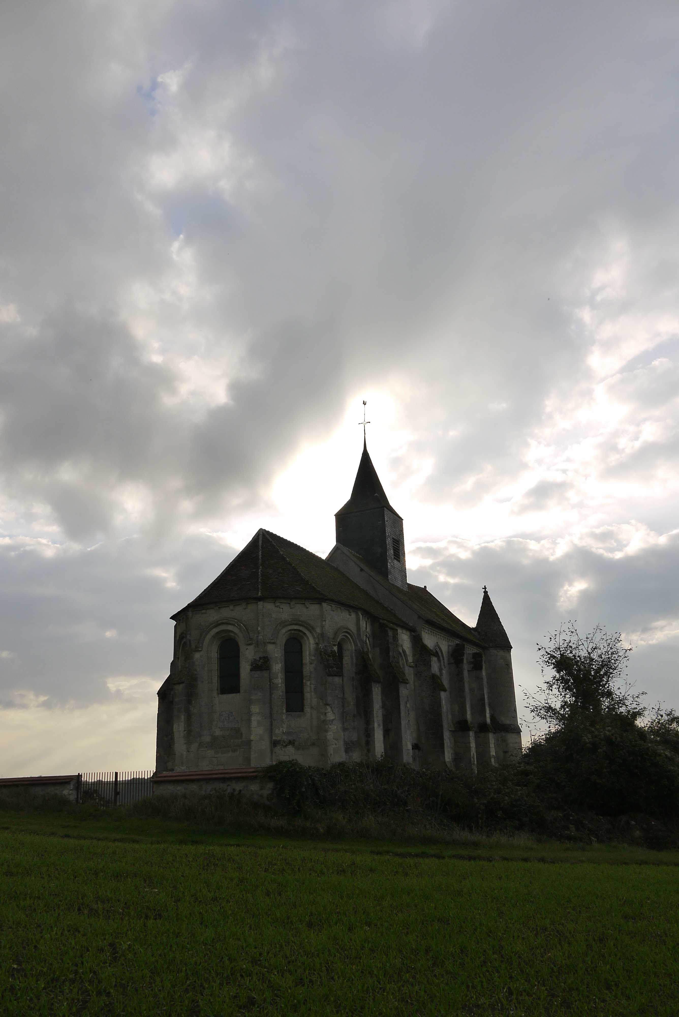 Église Saint-Martin de Marizy-Saint-Mard